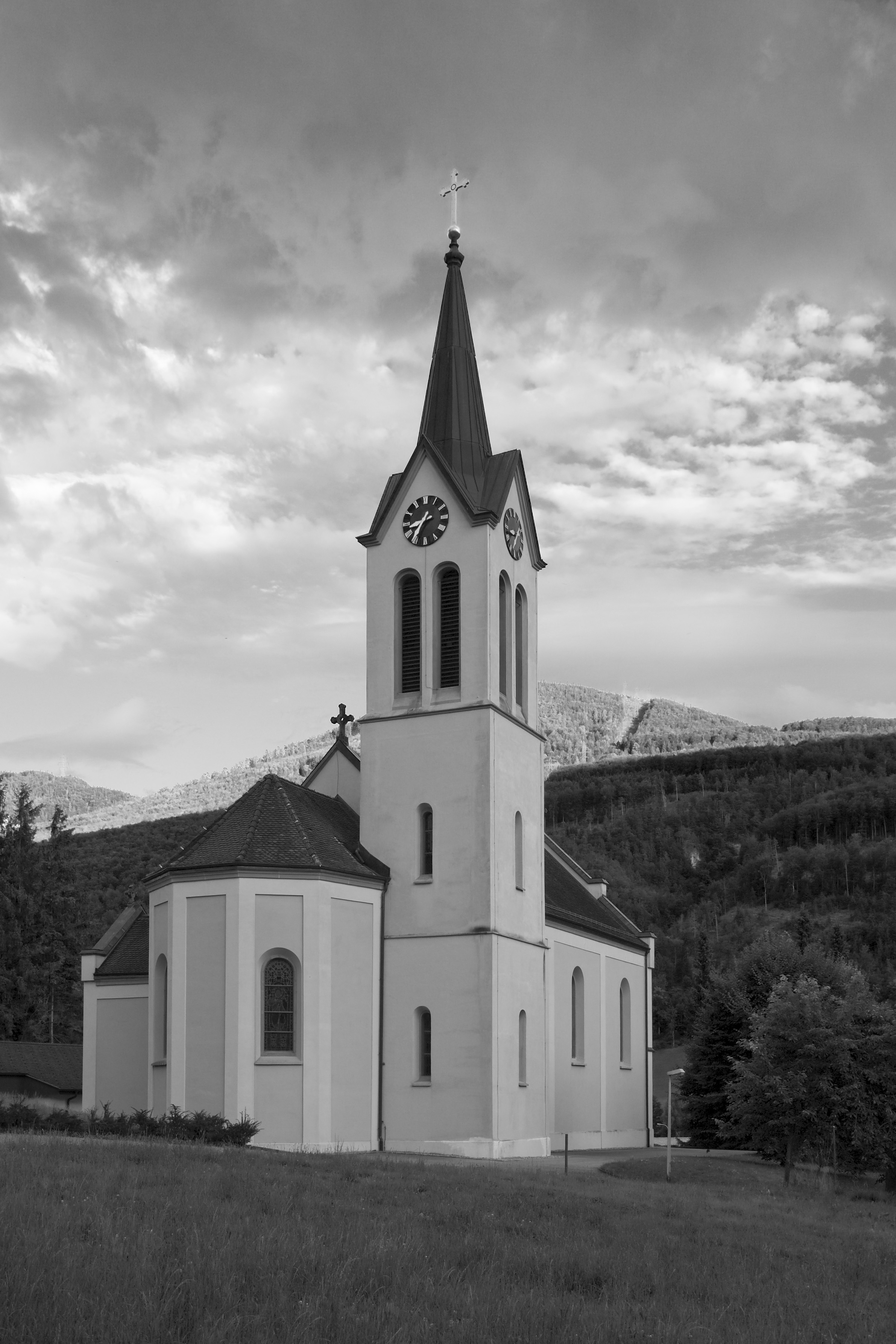 Die römisch-katholische Kirche Herbetswil, Zeuge des historistischen Rundbogenstils